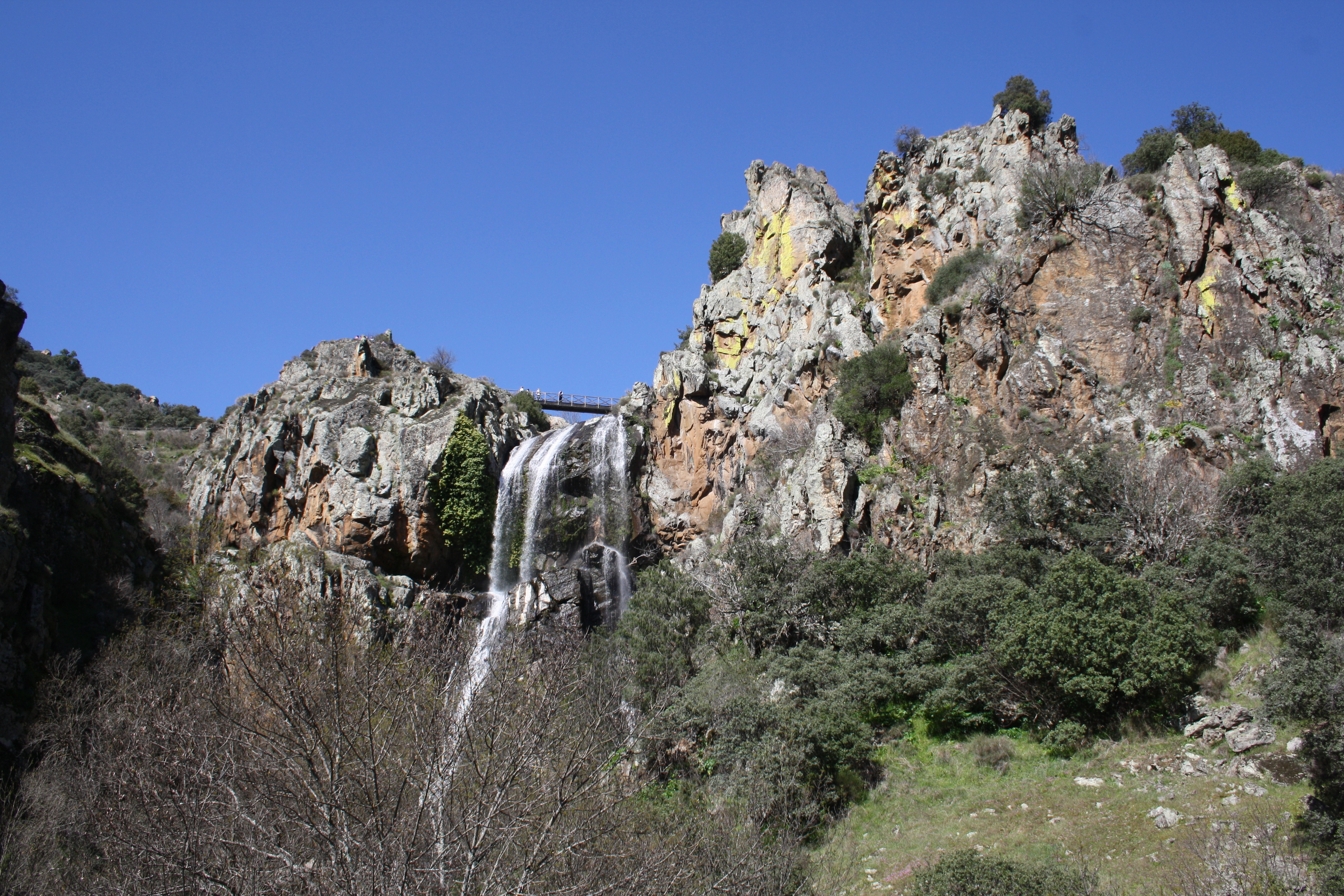 Cascata situada em Lamoso, distrito de Bragança, Portugal